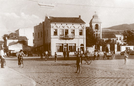 Старата црква „Св. Константин и Елена“ во Битола